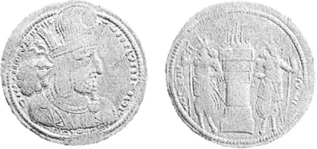 Dracma de bilhão de Sapor I